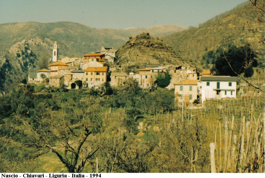 Nascio - Chiavari - Italia - Ottobre 1994